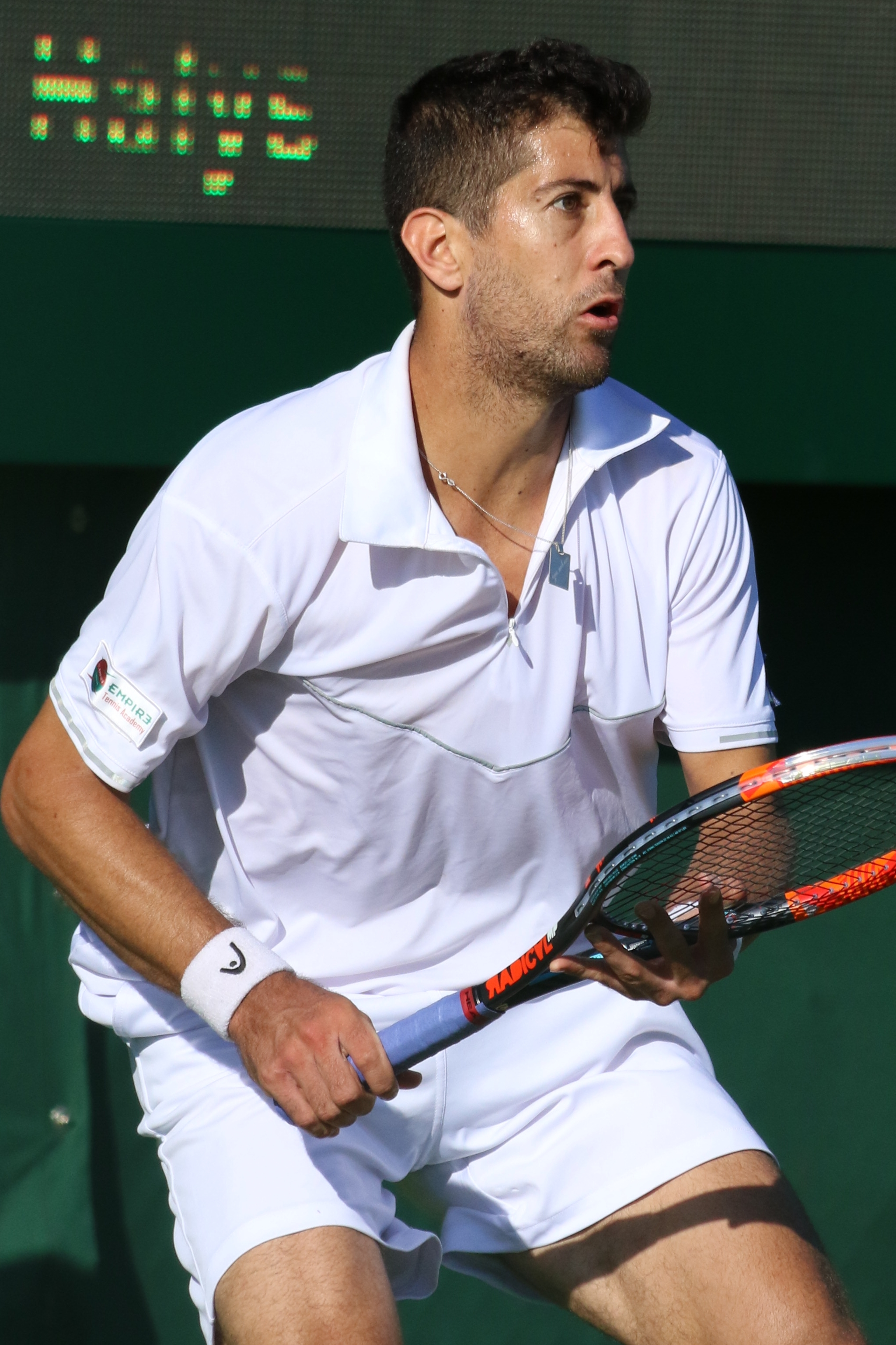 Podlipnik Castillo WMQ16 (7)